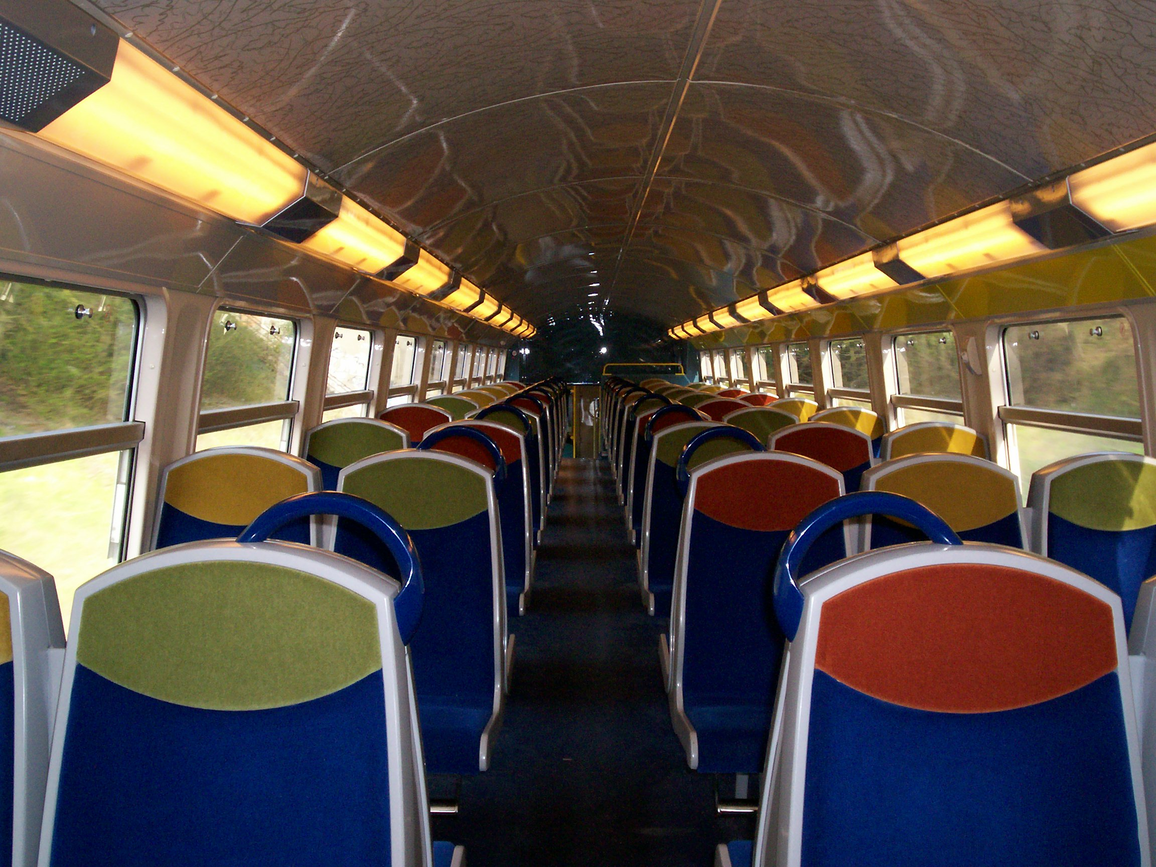 Intérieur d'un Z20500 Rénové